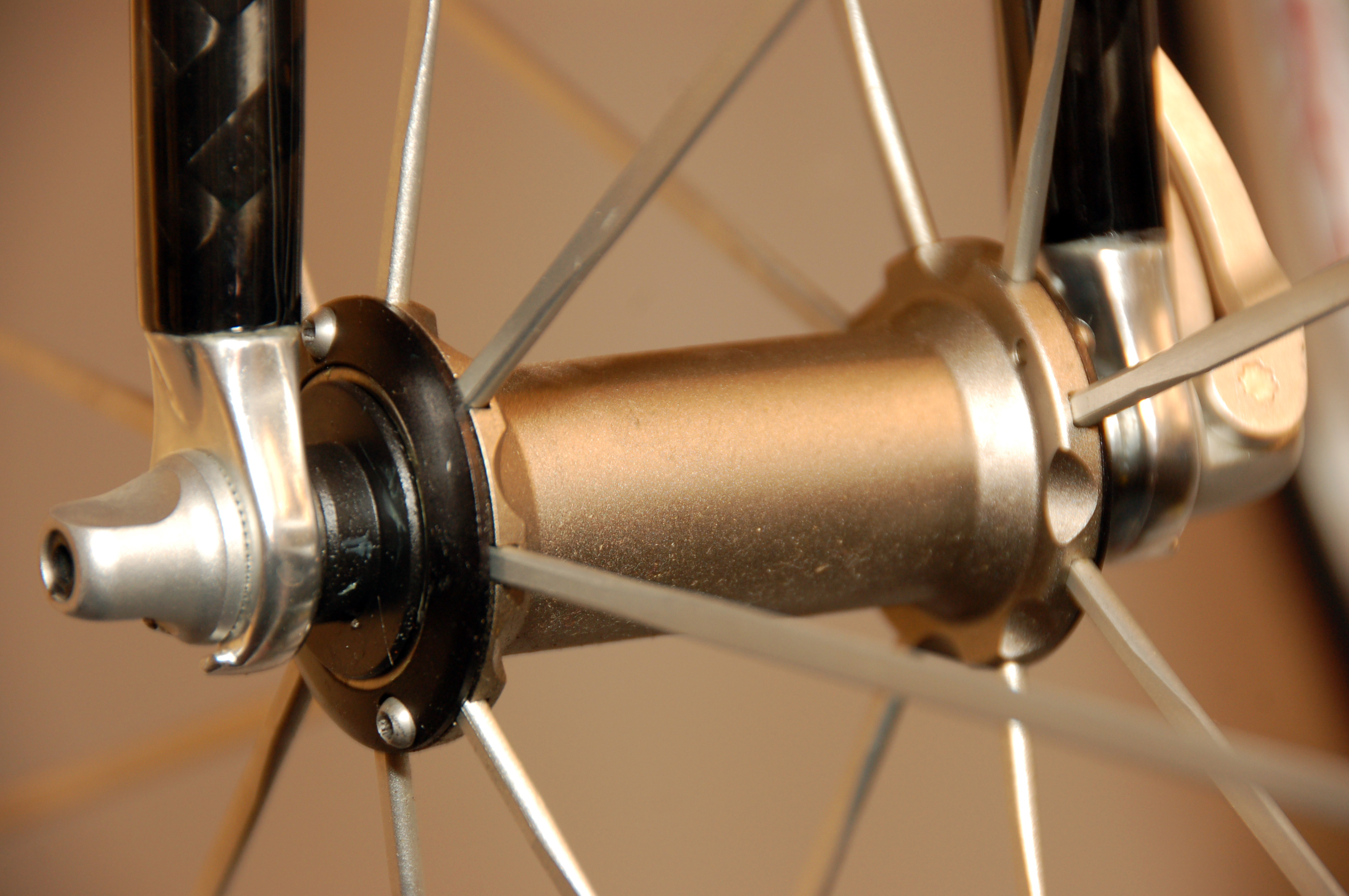 Detail Fahrradtechnik; mit freundlicher Genehmigung von - fahrradvermietung am Kurfürstendamm